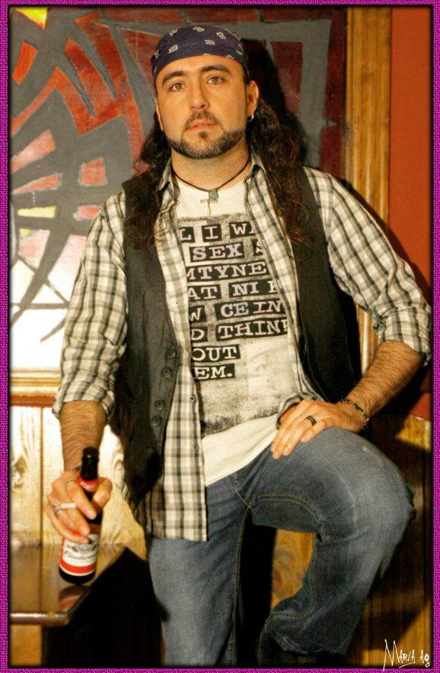 Ricki Vañó en el día de la presentación de Sexty Nice